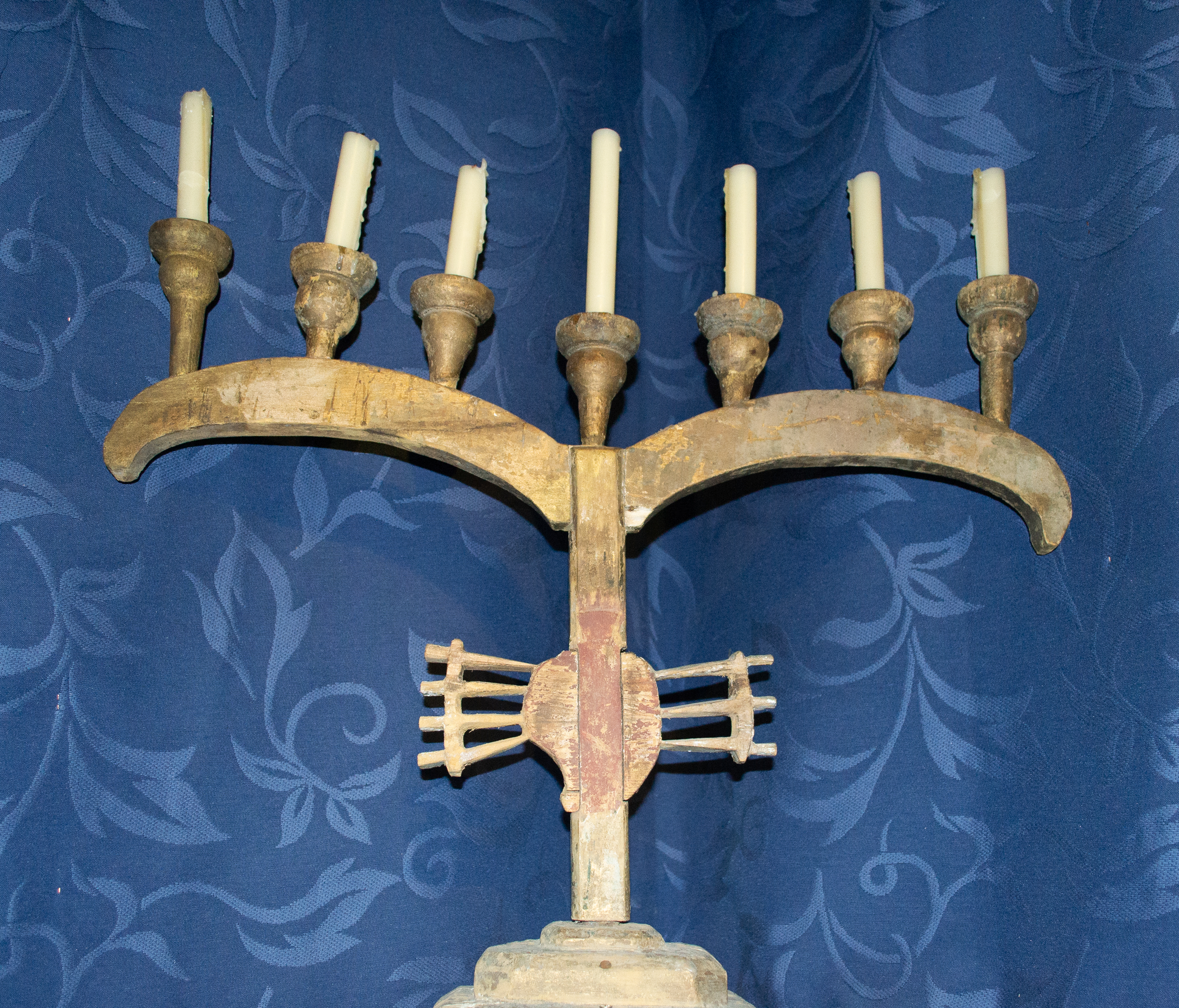 Menorá de un judío converso. Siglo XVI. Conservado en el Palacio de los Olvidados.